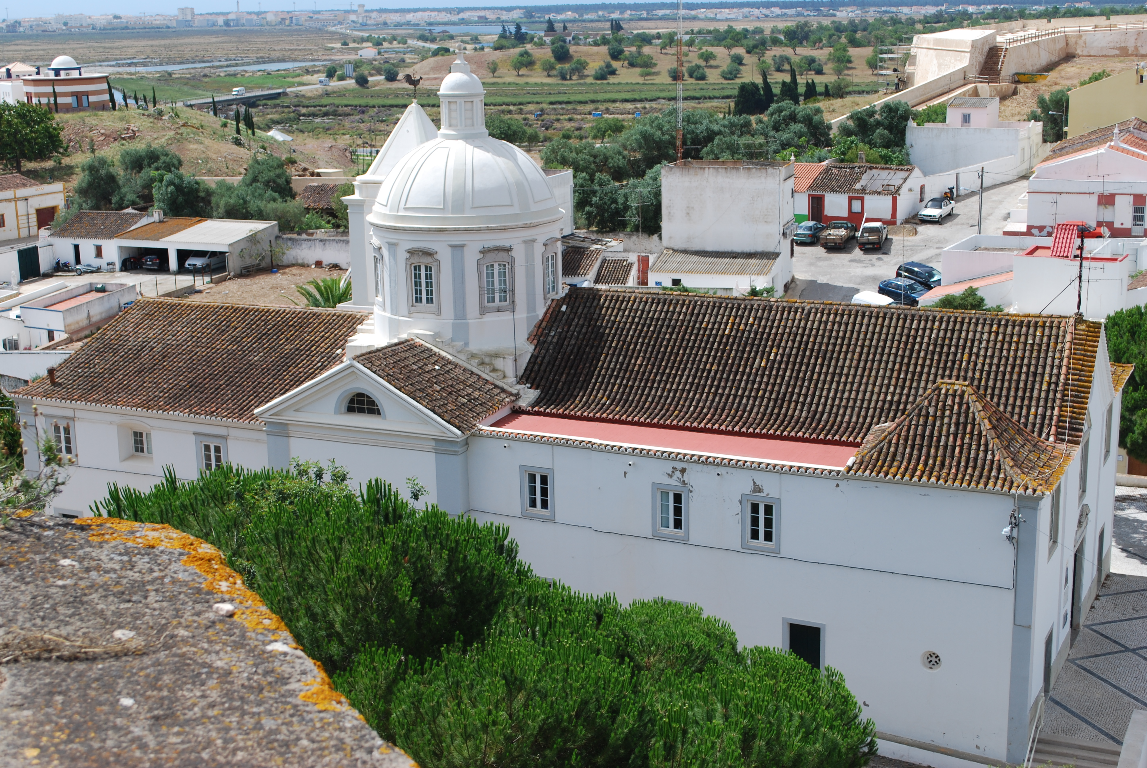 Igreja Paroquial de Nossa Senhora dos Mártires This file was uploaded for Wiki Loves Monuments in Portugal with the unique identifier 97008410.